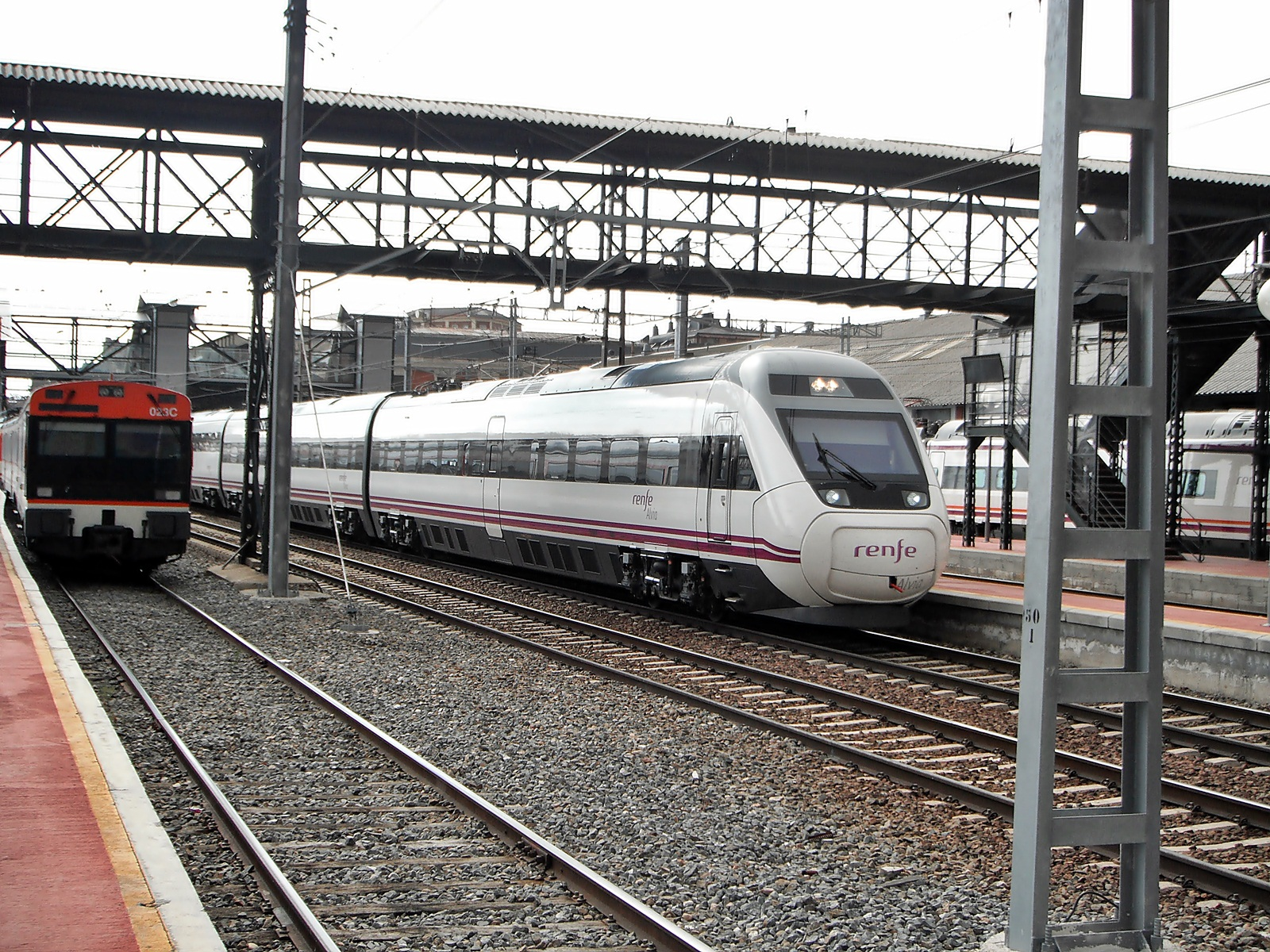 Alvia 120 saliendo de Valladolid en la ruta Valladolid-Hendaya